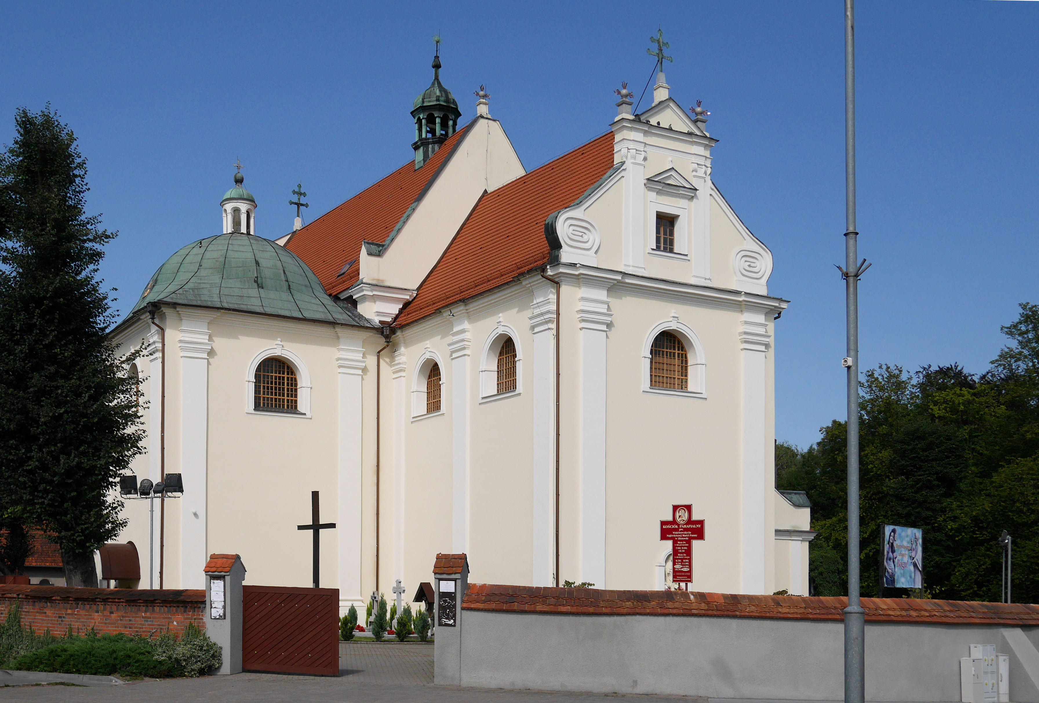 Złotów, kościół par. p.w. Wniebowzięcia NMP, 1660-1664